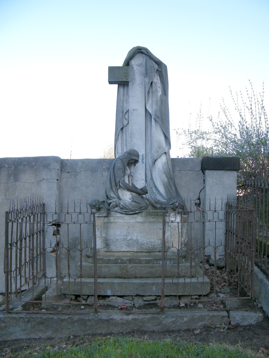 Kostel svatého Mikuláše v Mikulášovicích, náhrobek Anny Marie Römischové